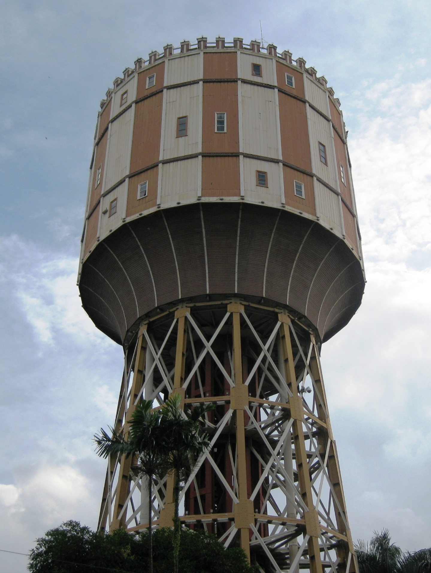 Tirtanadi Water Tower, Medan